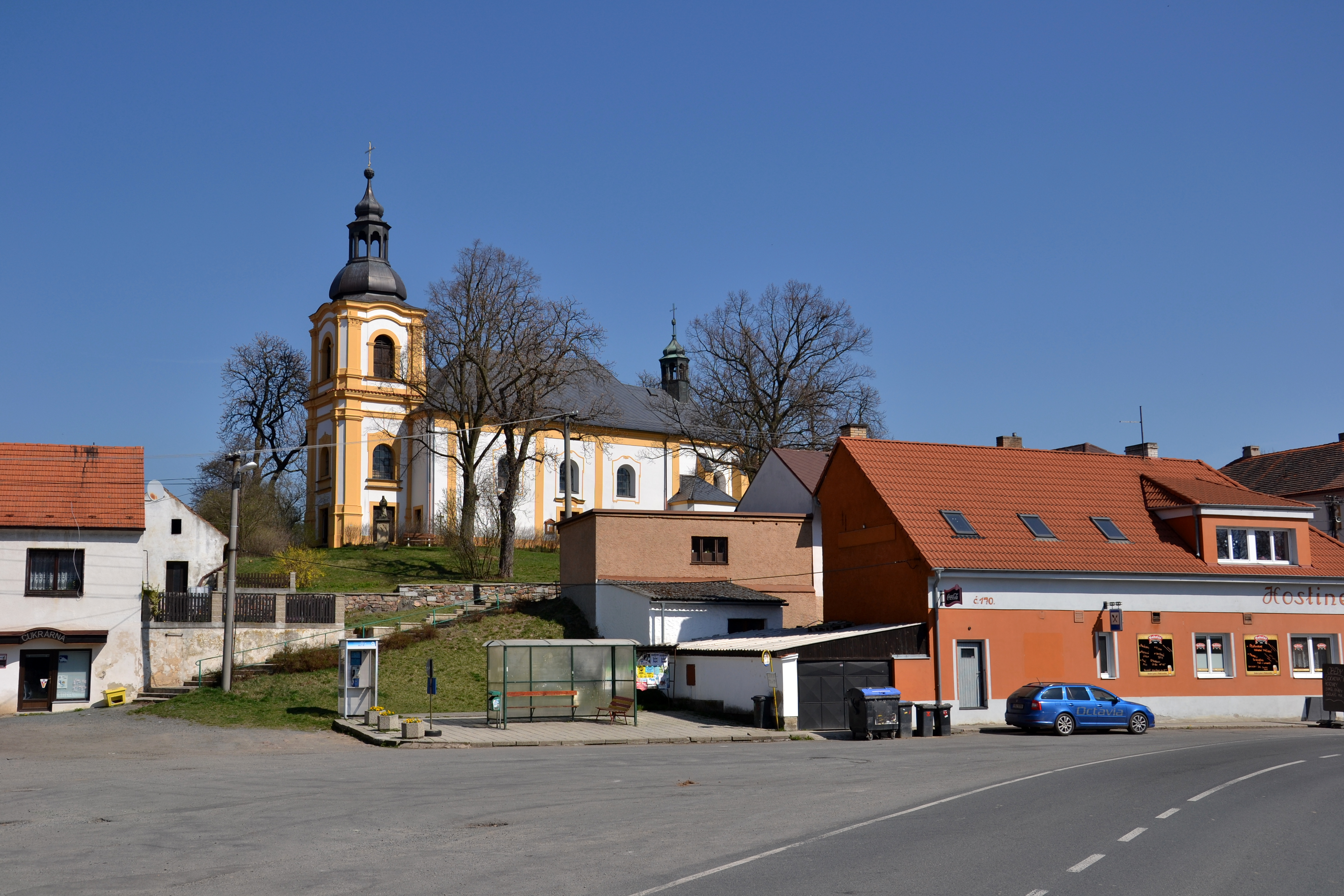 Náves a kostel svatého Václava na návrší ve středu obce, Čistá (okres Rakovník)